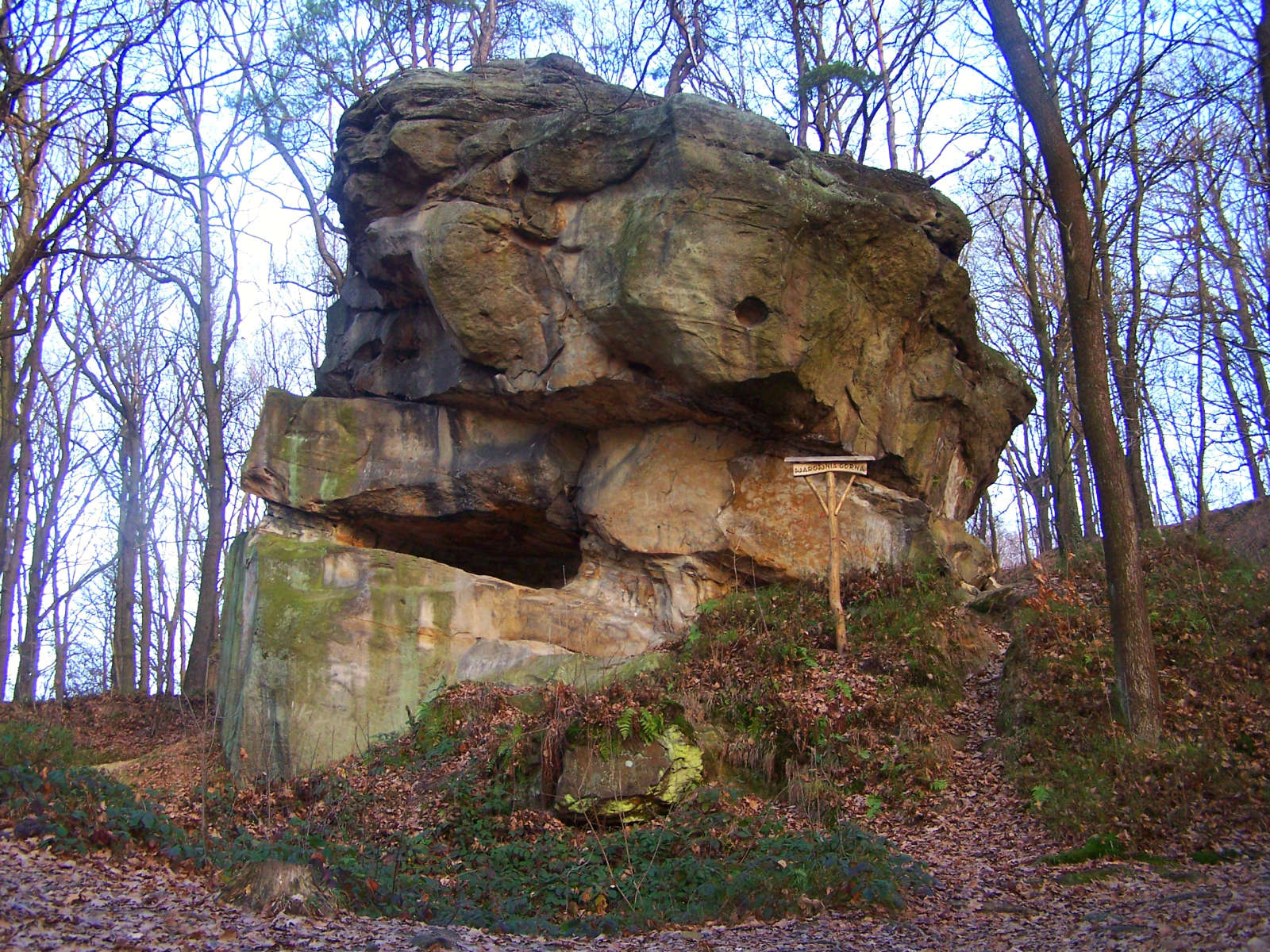 Warownia Górna w rezerwacie przyrody Skamieniałe Miasto (Pogórze Rożnowskie)